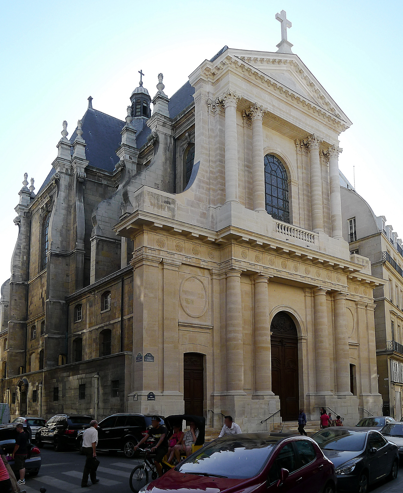 Temple protestant de l'Oratoire du Louvre à l'angle des rues Saint-Honoré et de l'Oratoire - Paris Ier .